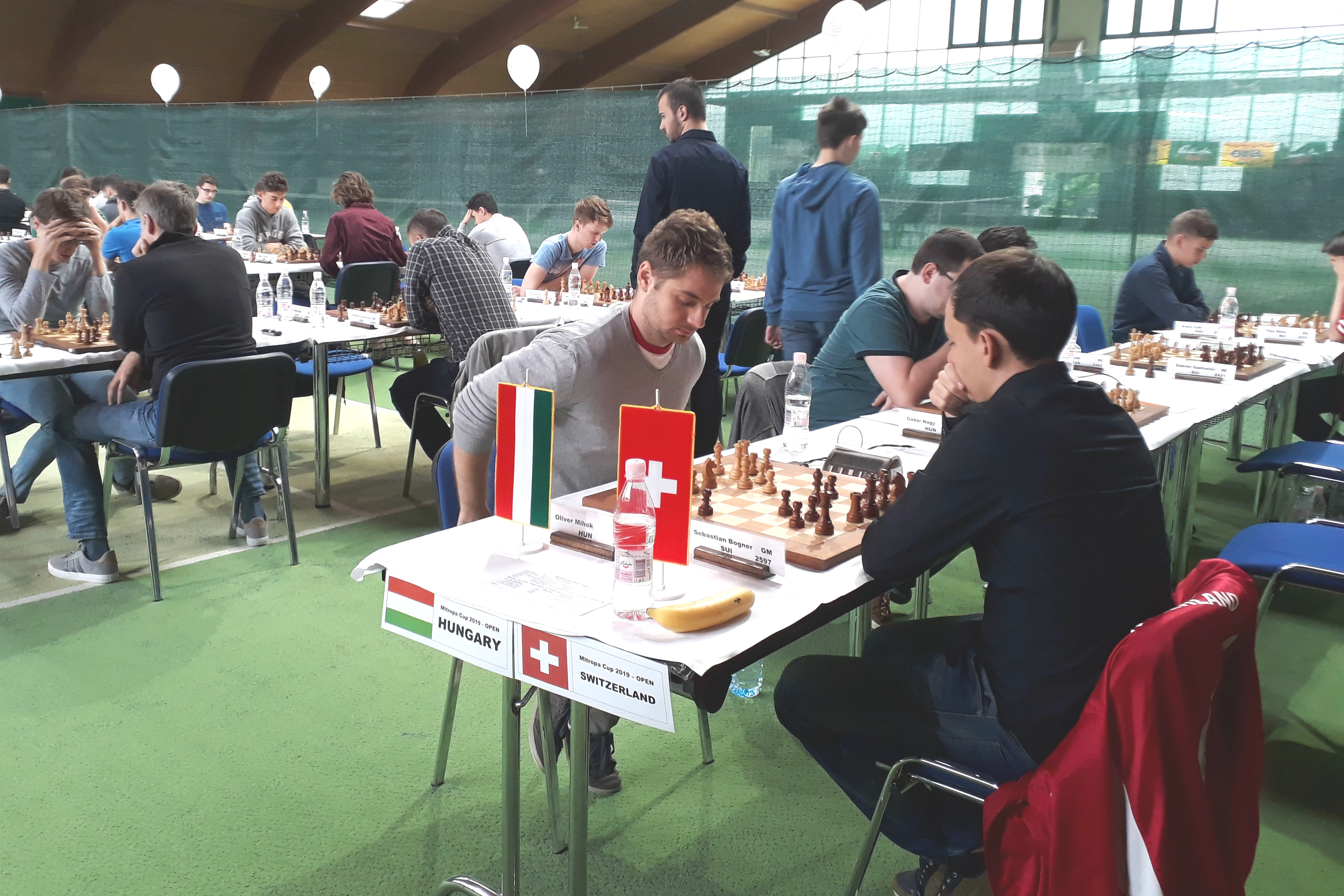 Ungarn-Schweiz: Oliver Mihok an Brett 1, Runde 4 Mitropa Cup 2019 in Radenci.